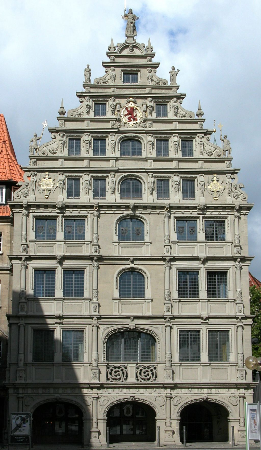 Braunschweig: Ostfassade des Gewandhauses